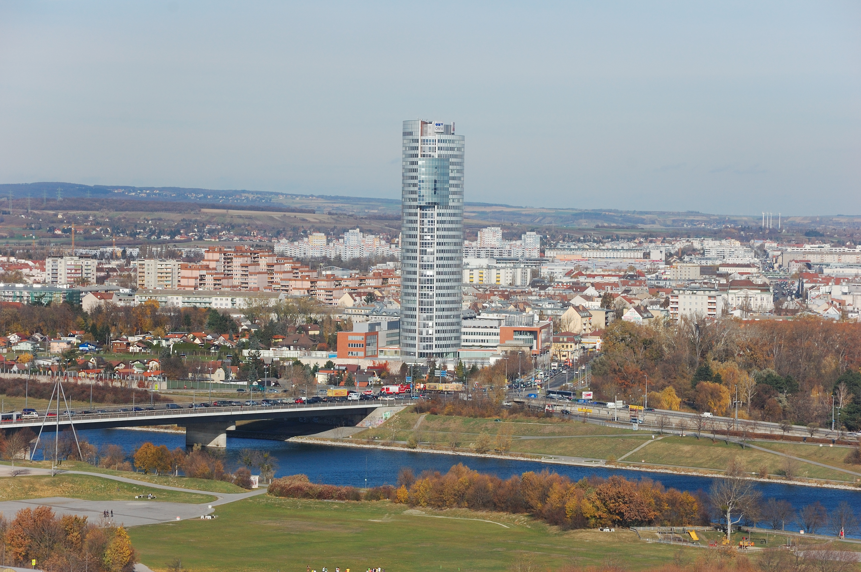 Floridsdorf